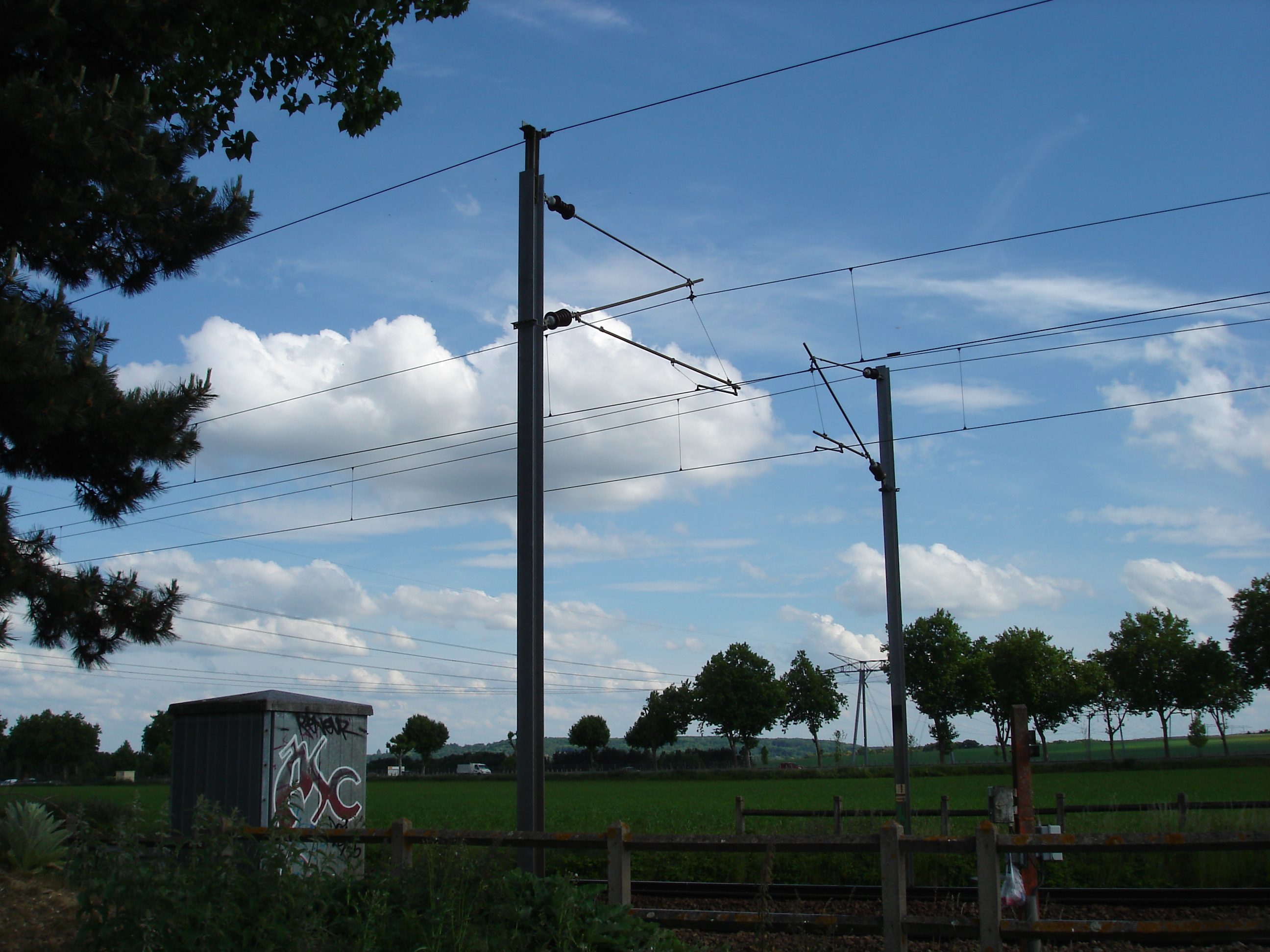 La caténaire 25 kv 50 hz, de la ligne de Saint-Cyr à Surdon, à Méré (78).